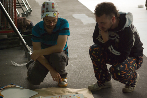 Yoann Lemoine en compagnie du styliste Jean Paul Lespagnard sur le tournage du clip de Yelle.